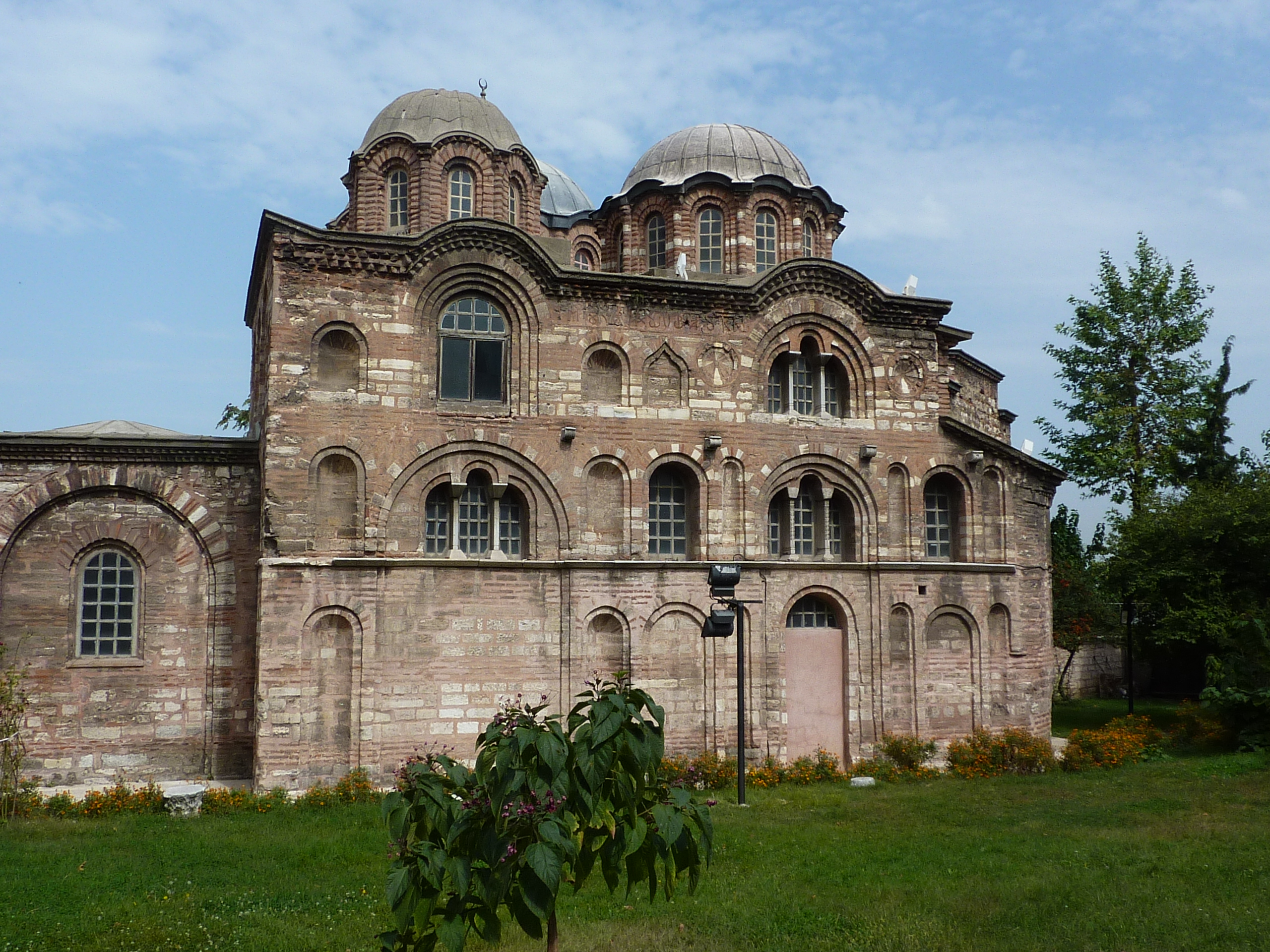 Pammakaristos Church.